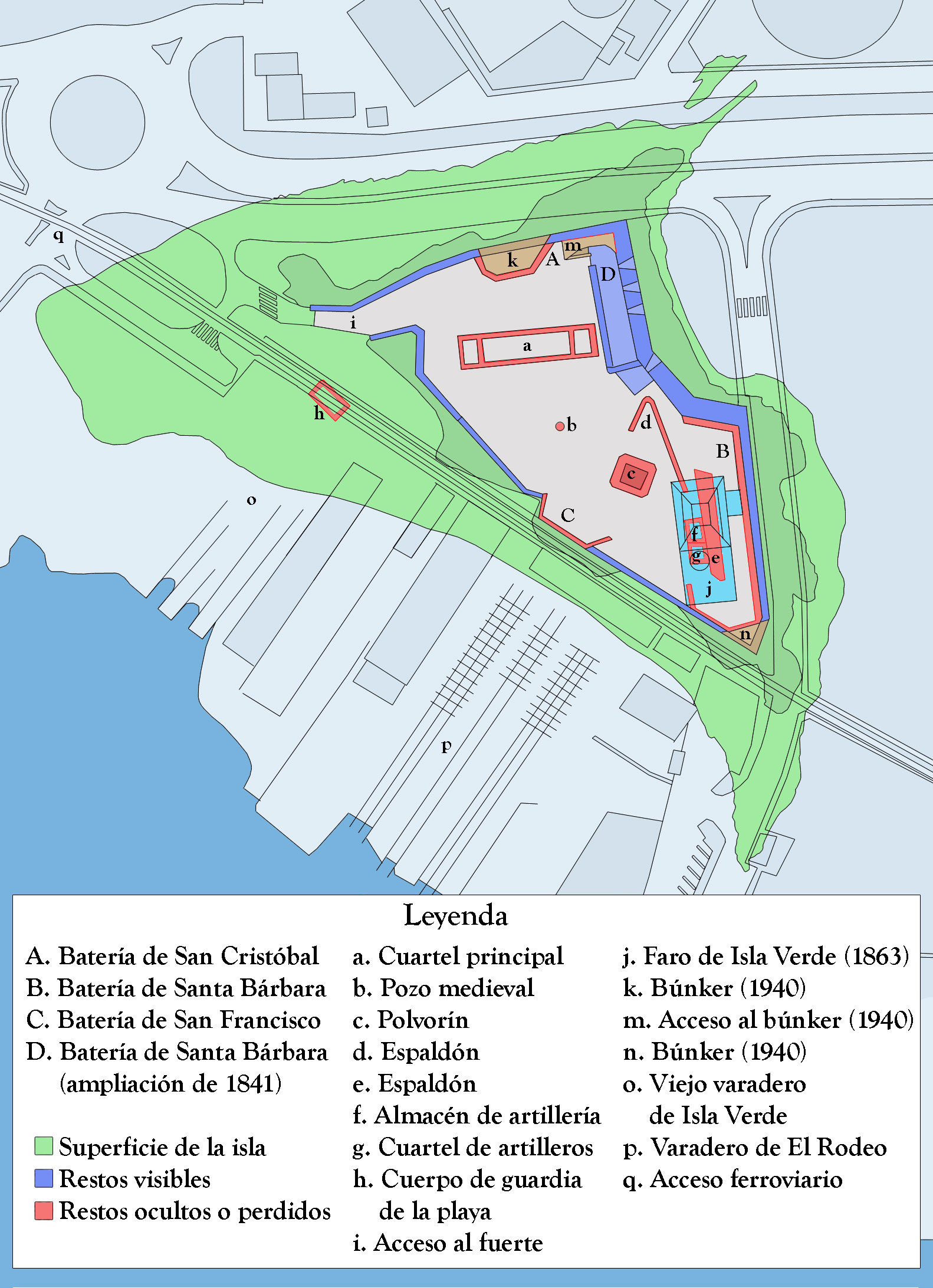 plano del Fuerte de Isla Verde de Algeciras. Imagen realizada para Wikimedia a partir de planos antiguos.